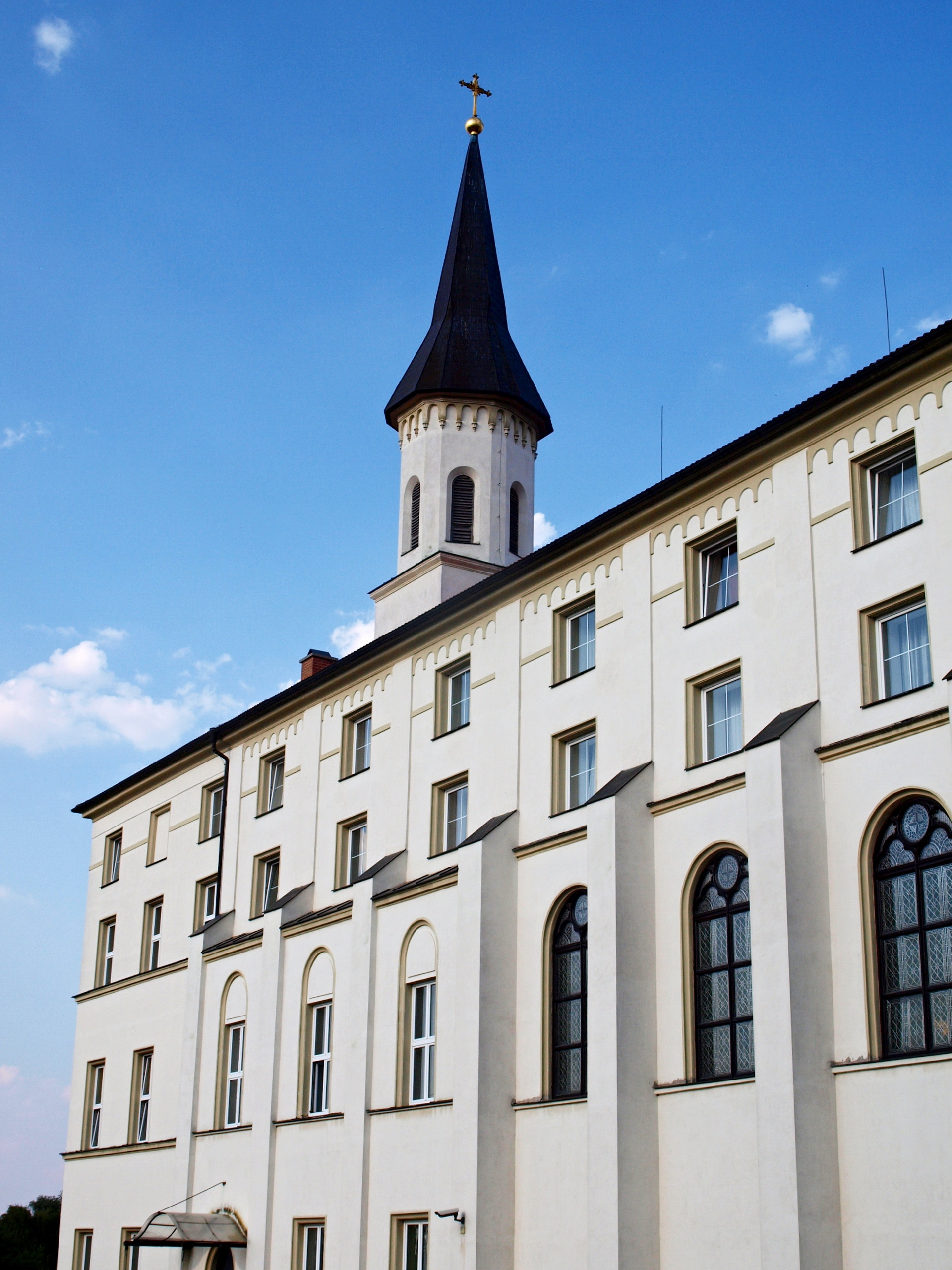 Klášter sester boromejek v Praze-Řepích